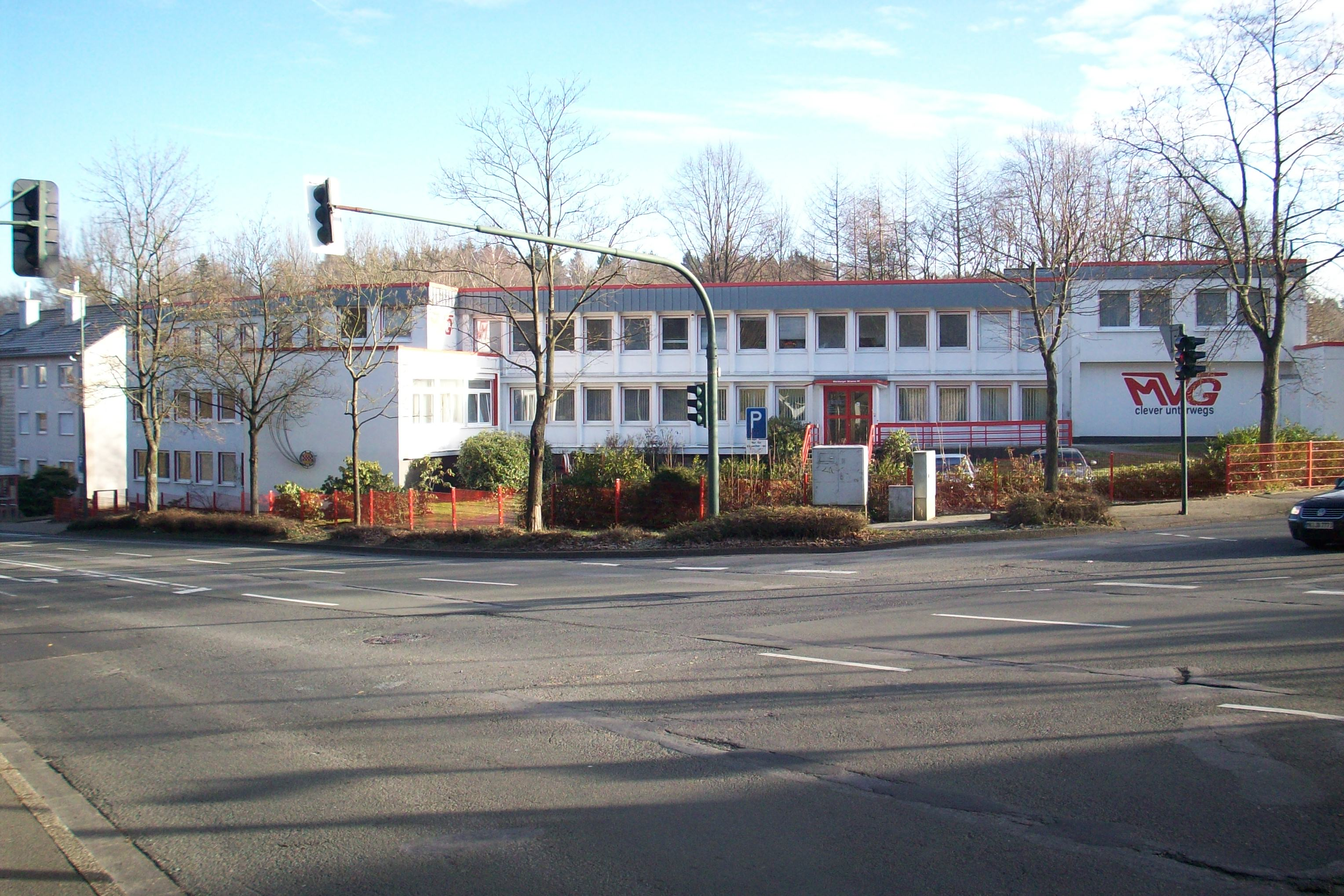 Das Verwaltungsgebäude der Märkischen Verkehrsgesellschaft GmbH in Lüdenscheid.